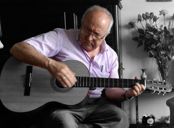 María Teresa Oller Benlloch i Fermín Pardo Pardo en juliol de 2015 mentres li entrevistaven Fermín Pardo i Joan Seguí per al Museu Valencia d'Etnologia